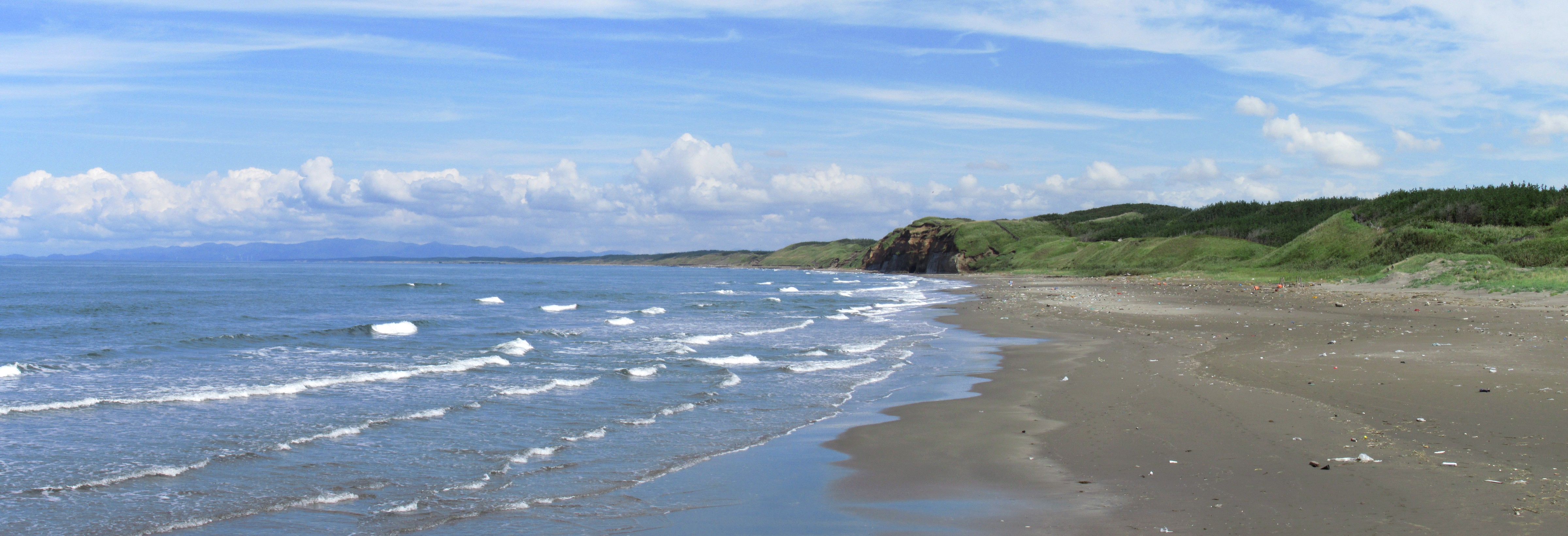 日本国,青森県,西津軽郡,七里長浜,出来島海岸付近